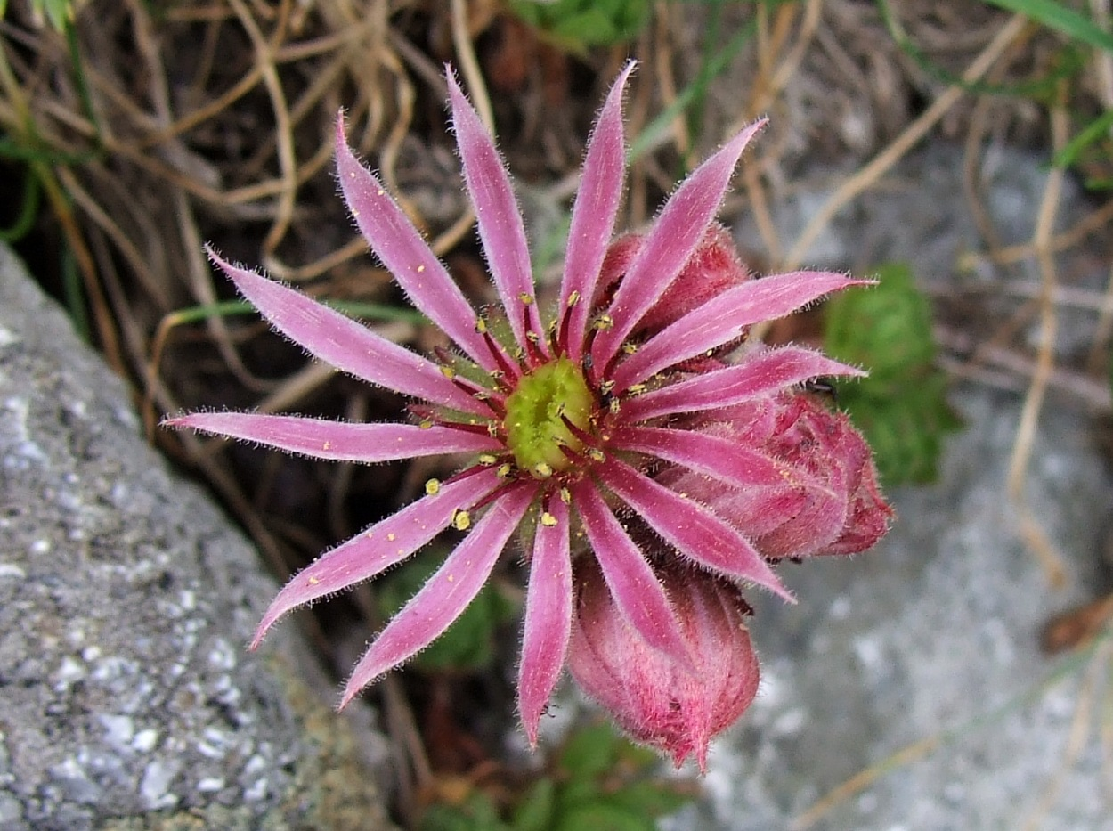 Sempervivum montanum (pl. rojnik górski), habitat: West Tatra Mountains, Trzy Kopy